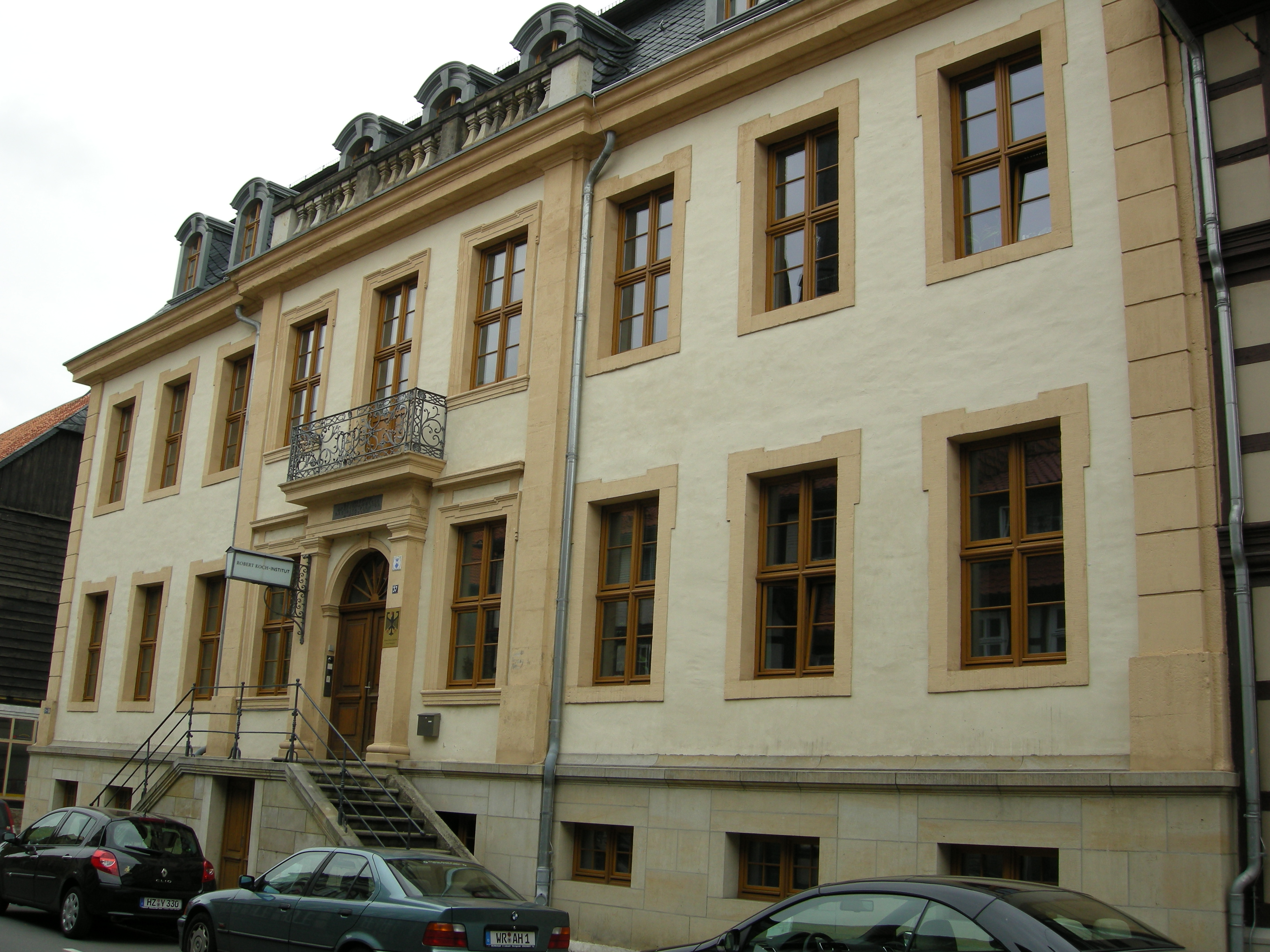 Das Robert-Koch_Institut Außenstelle Wernigerode